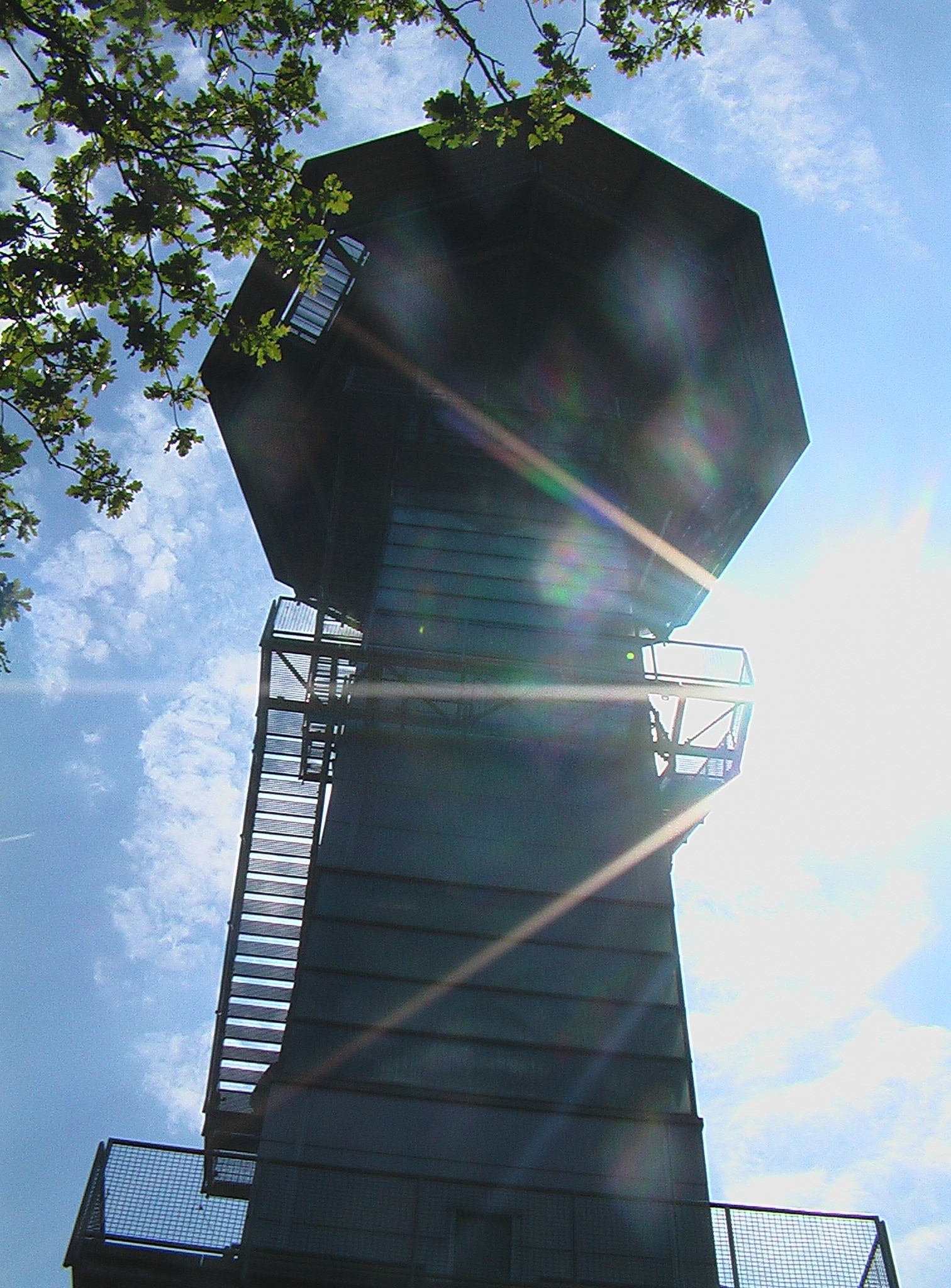 Boudewijntoren drielandenpunt Vaals